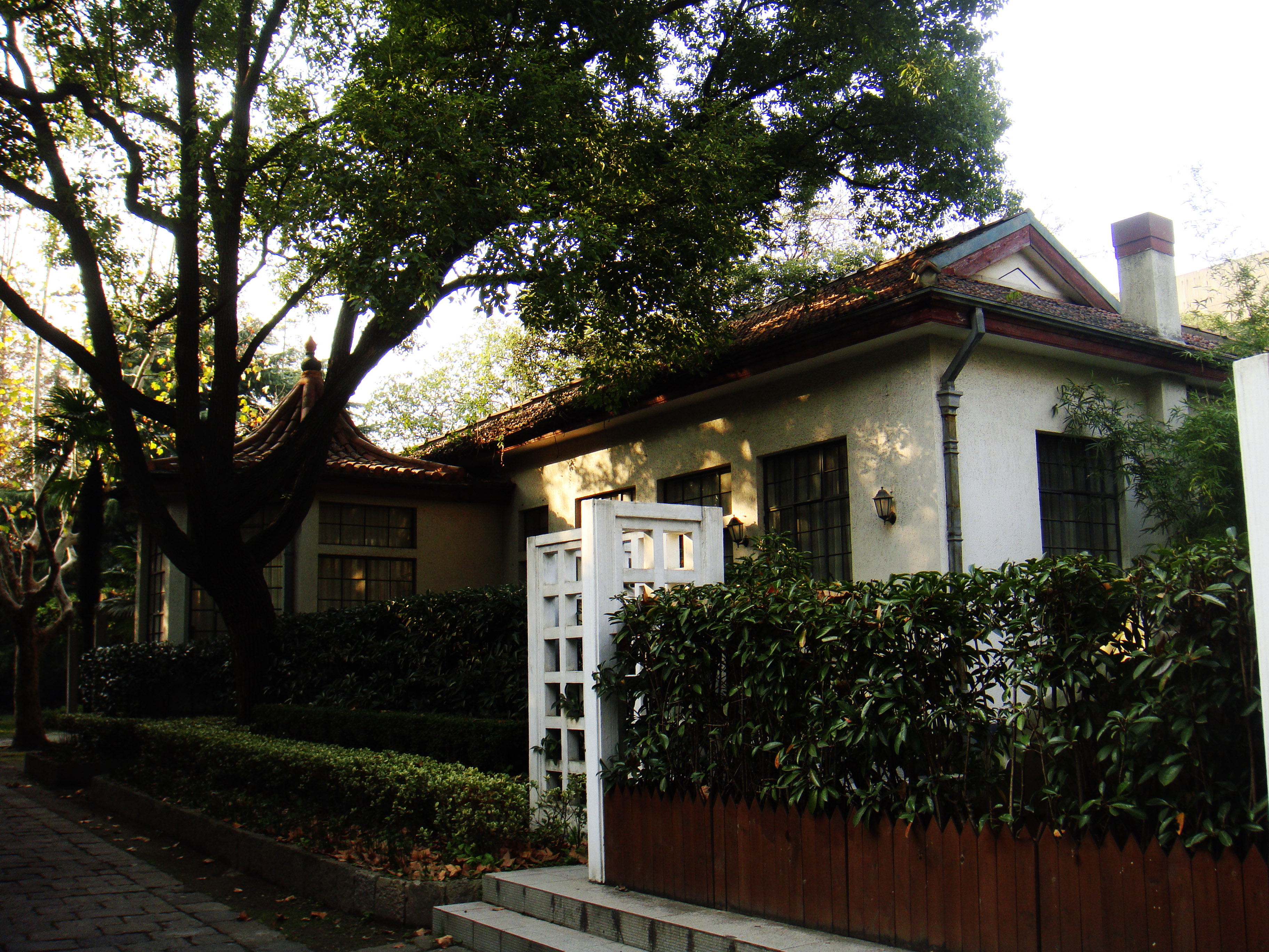 复兴岛公园的白庐外观